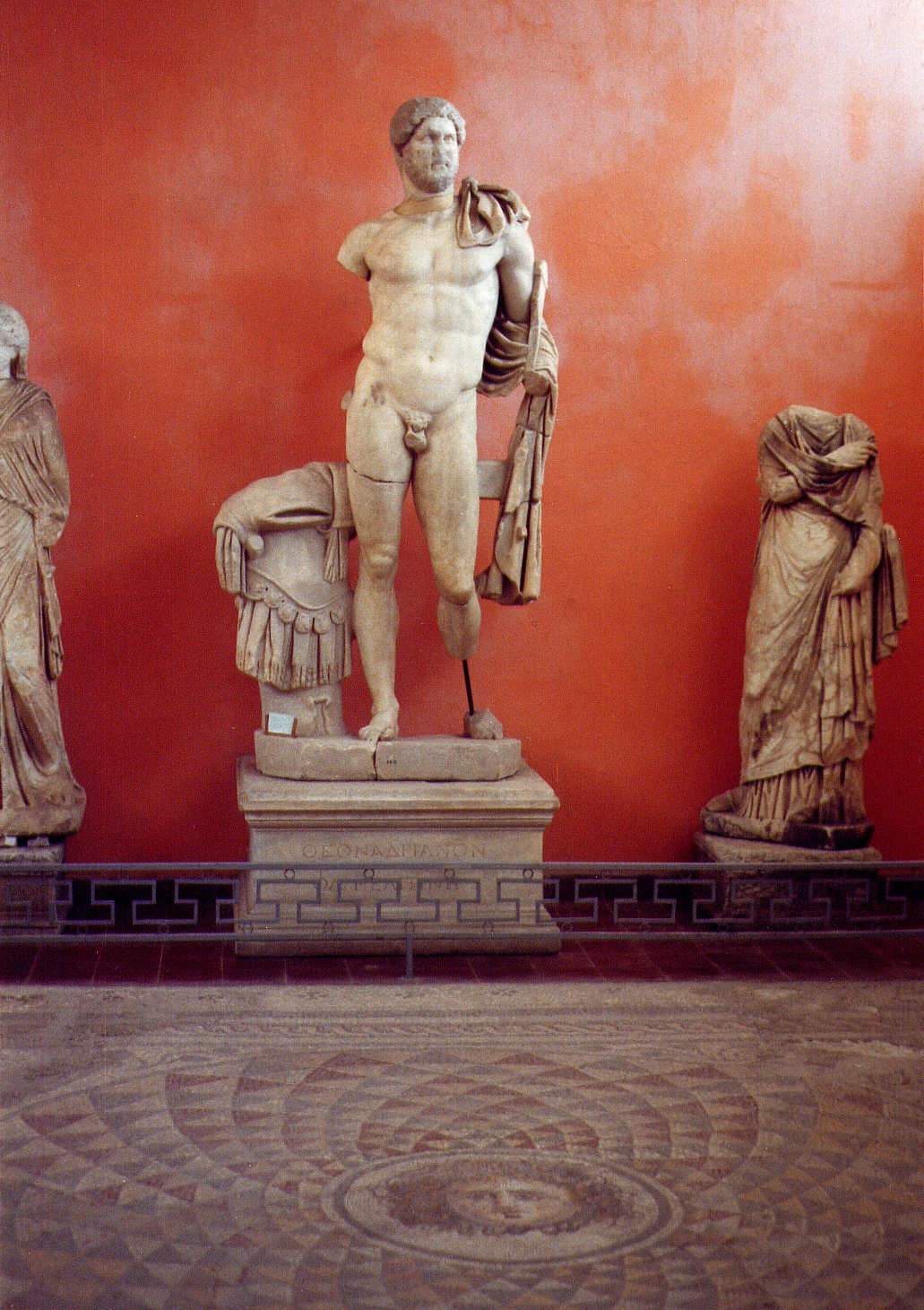 Museum Bergama, Türkei, Hadrianstatue aus der Bibliothek des Asklepieion